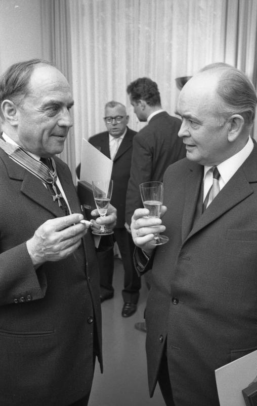 Empfang und Ordensverleihung an Bundestagsabg. durch Bundestagspräsident Dr. Gerstenmaier Bonn (Hamacher, Hufnagel)